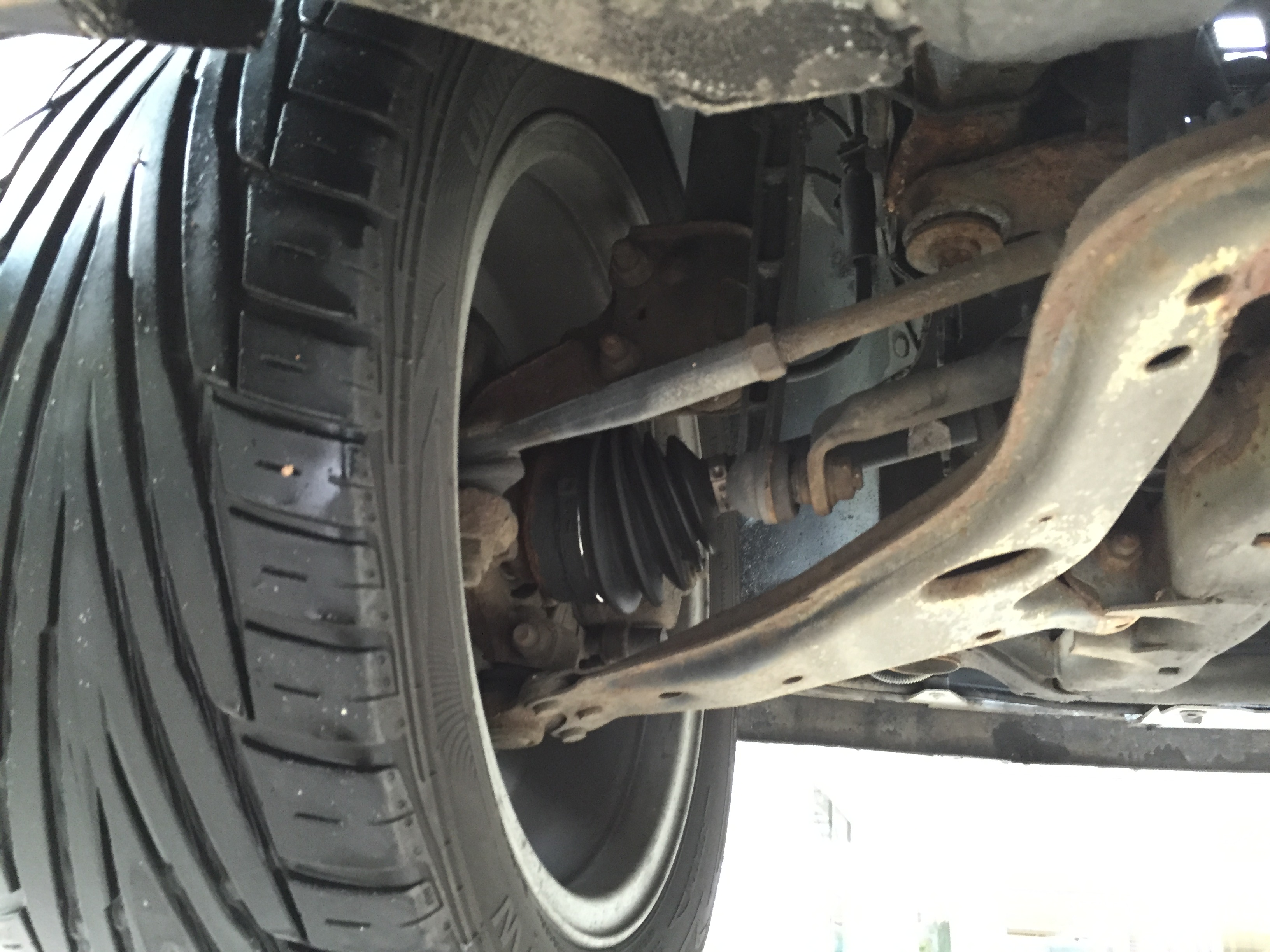 vordere Radaufhängung Opel Astra G